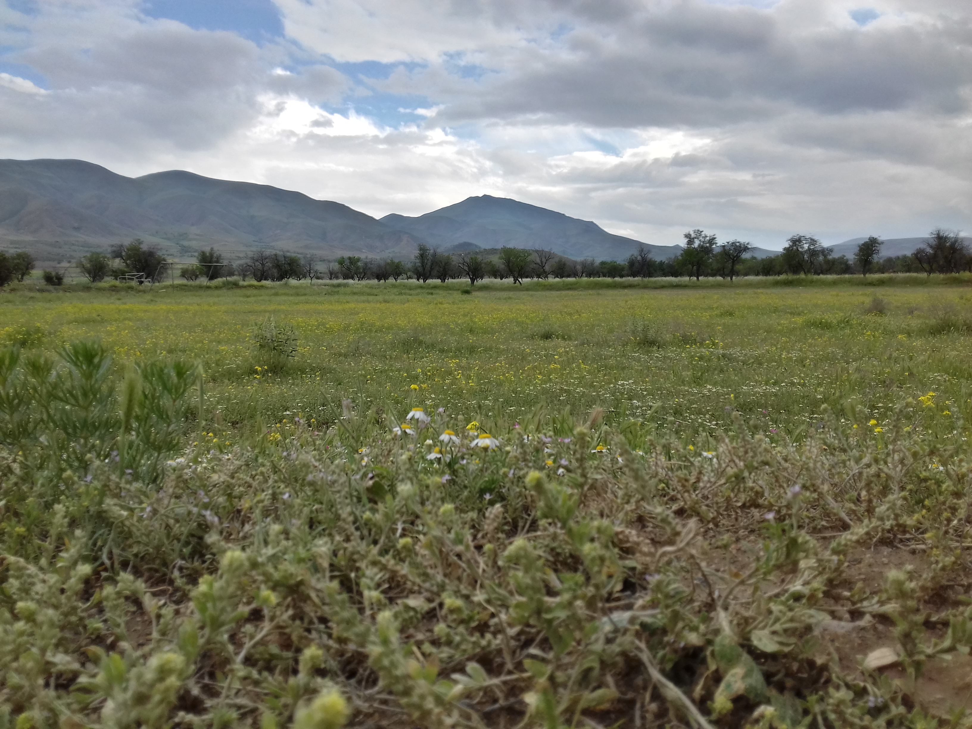 تصاویری از حومه روستای نجف آباد ارومیه، شامل طبیعت بکر و ورودی و... را مشاهده میکنید